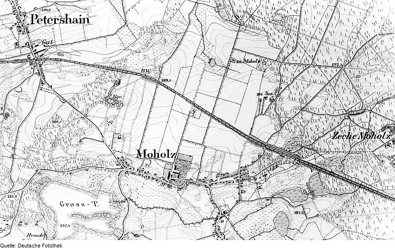 Original image description from the Deutsche Fotothek Niesky-See-Moholz. Meßtischblatt, 1:25.000, Sekt. Mücka, 1886